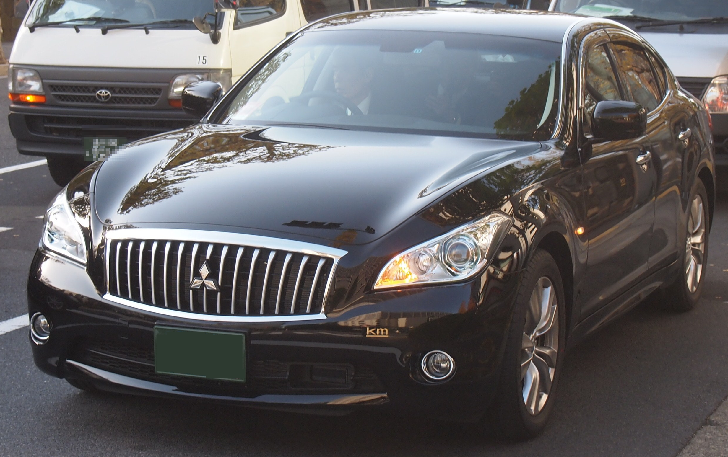 三菱・プラウディア